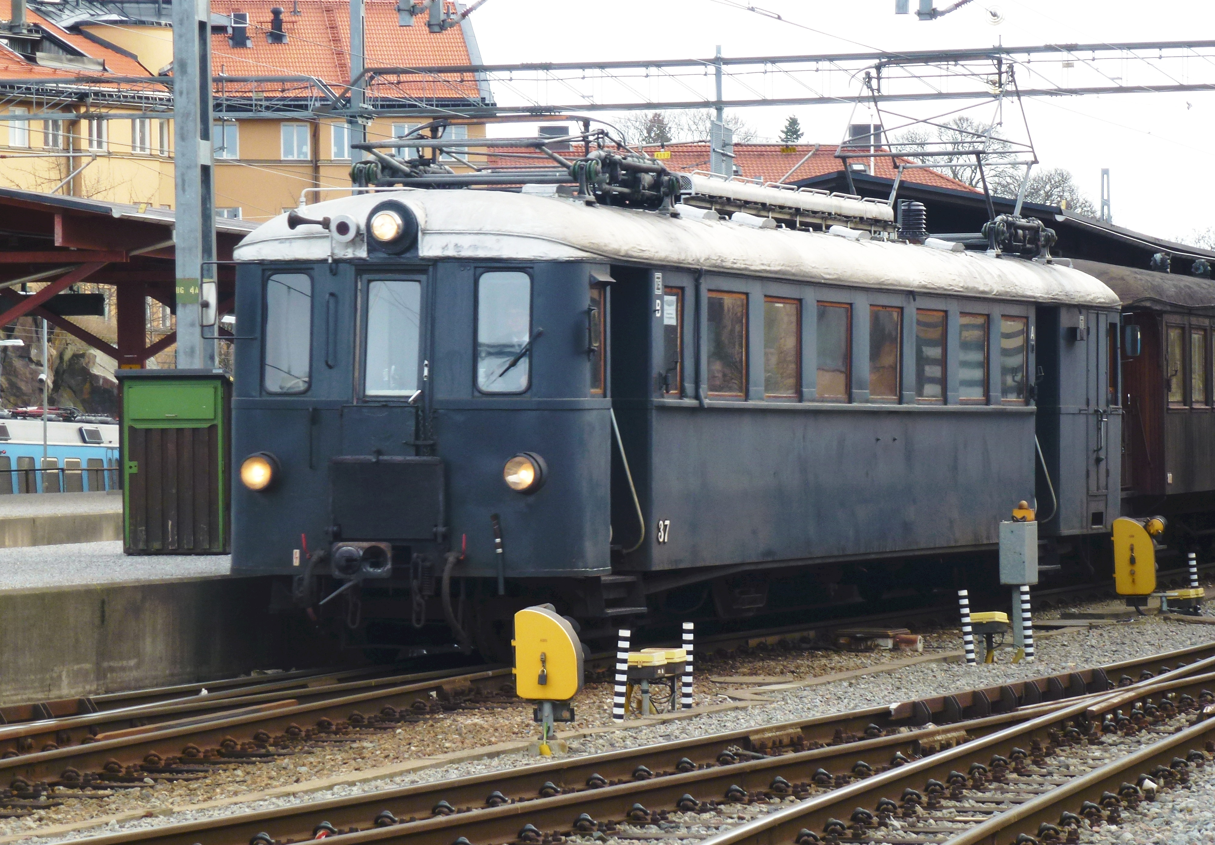 Roslagsbanan X4p 37 - SRJ 21